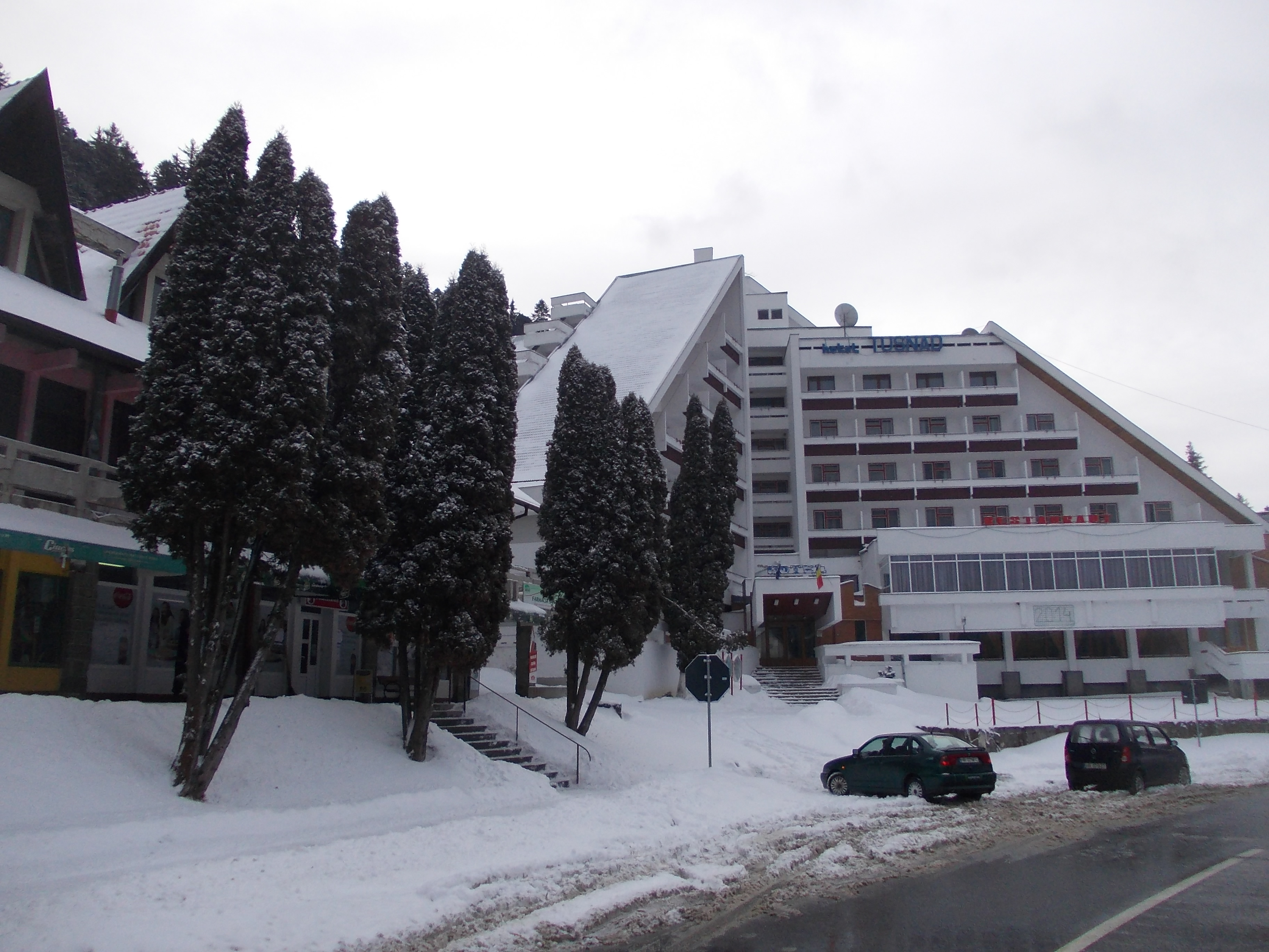 imagine din centrul oraşului Băile Tuşnad (magazine şi un hotel)